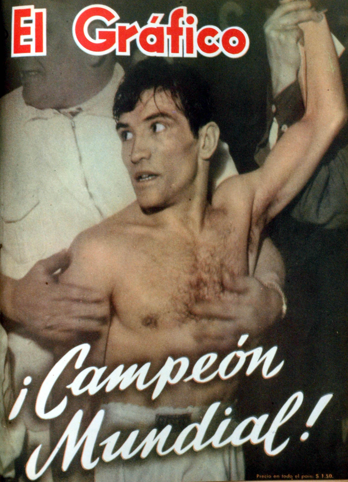 El Grafico del 10 de Diciembre de 1954. Edicion 1844